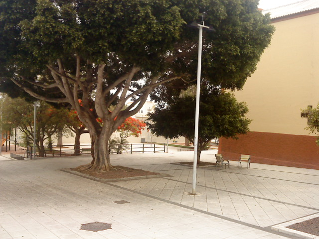 Plaza del barrio de Uruguay